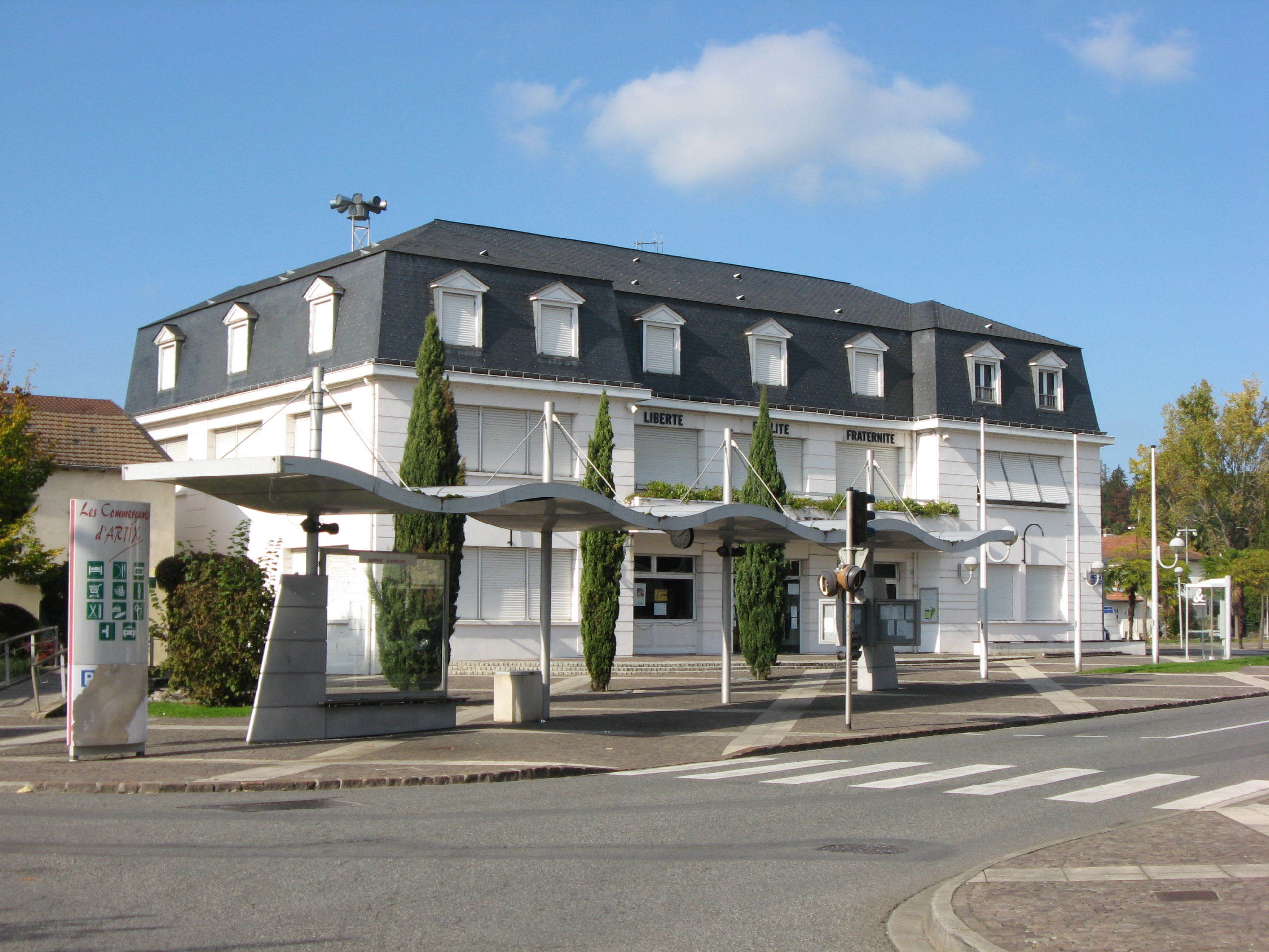 Vue de la mairie d'Artix (Pyrénées Atlantiques) Pyrénées).